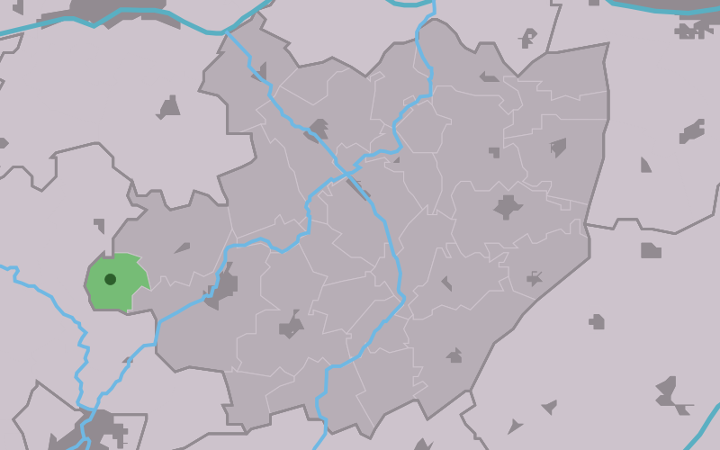 Kaartsje fan himrik fan Waaksens